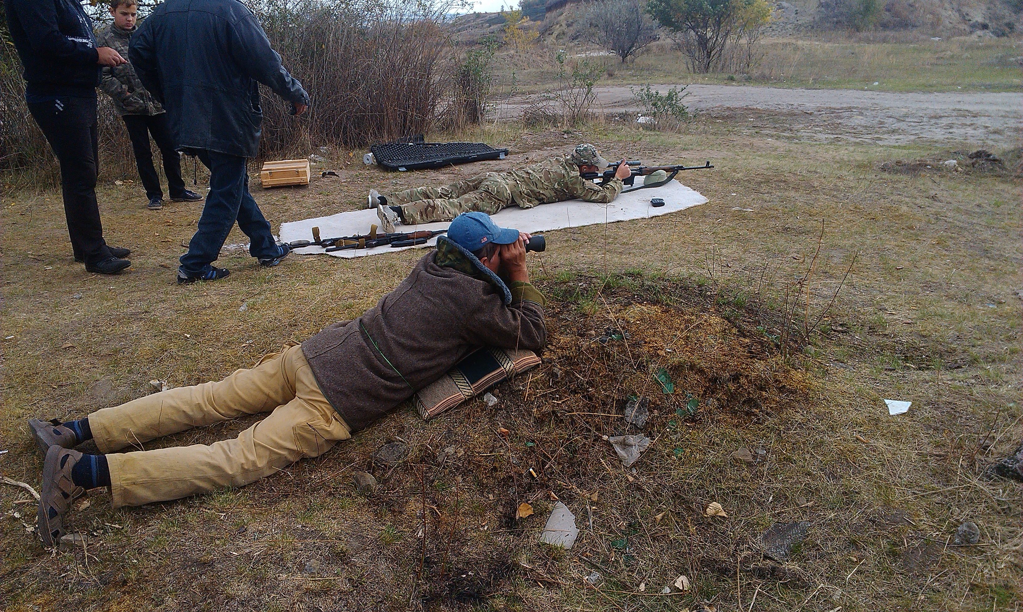 Тренування націоналістів-партизан